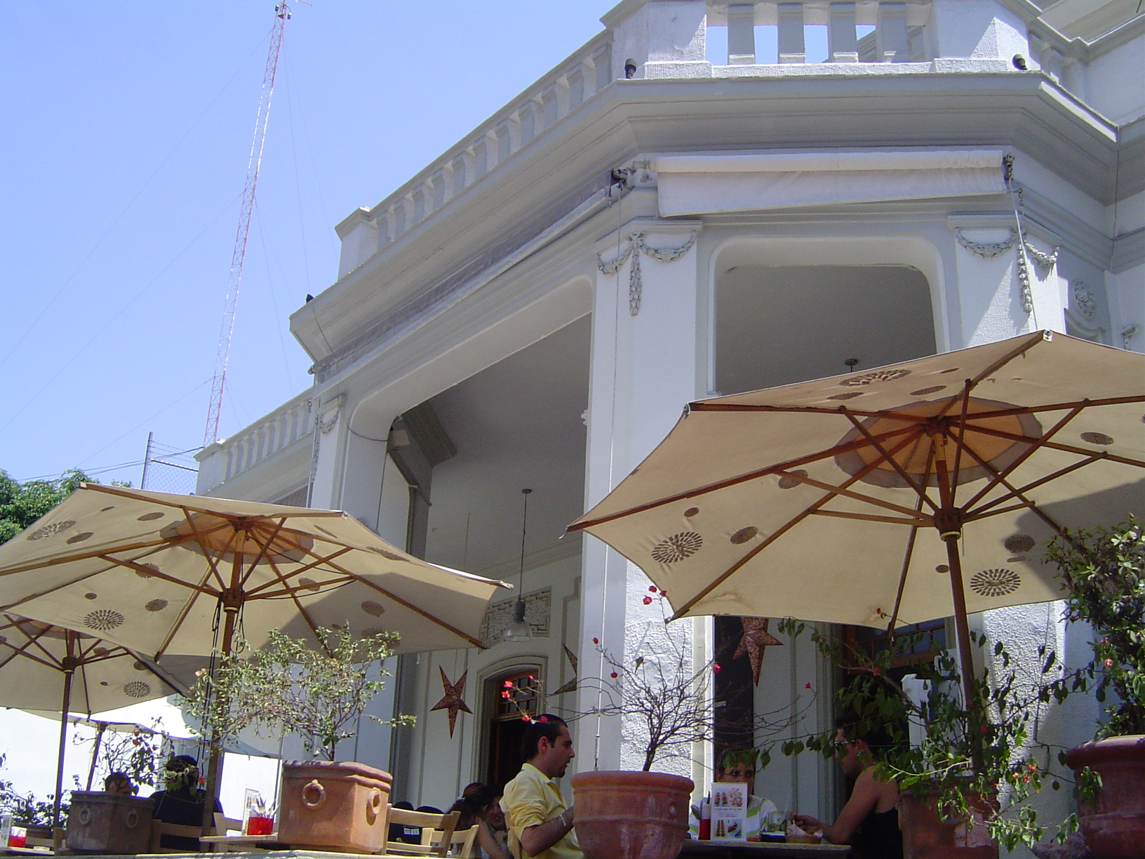 Guadalajara, Cafe in Vallarta. Autor: patrick.denizet